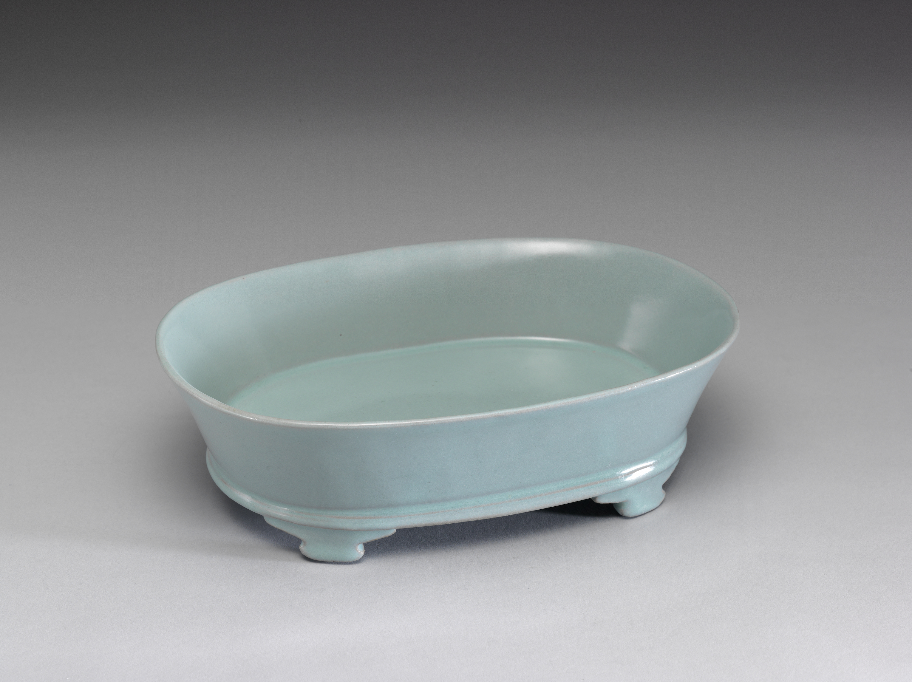 中文（中国大陆）: 北宋汝窯青瓷無紋水仙盆